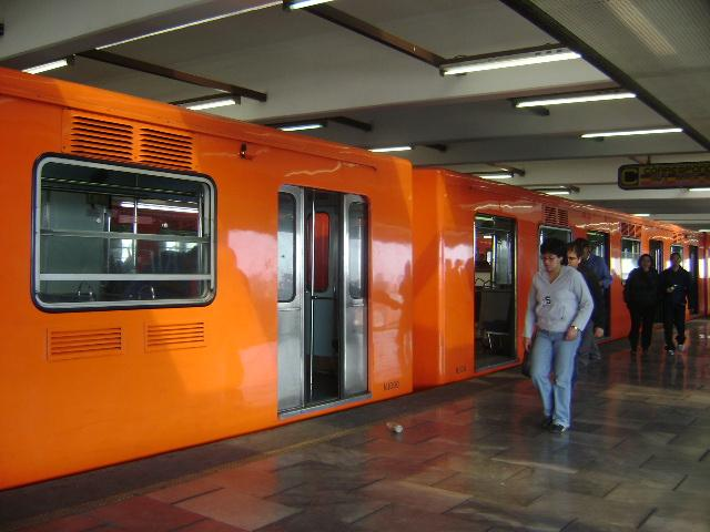 Un MP-68 en Pantitlán.Linea 9.